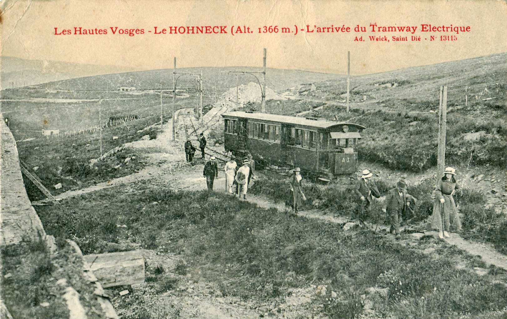 Carte postale ancienne éditée par Ad. Weick à Saint-Dié, collection Les Hautes Vosges, n°13115 :LE HOHNECK (alt. 1366 m.) - L'arrivée du Tramway ÉlectriqueAutomotrice A3 construite par De Dietrich construites à Lunéville, de 34 places assises et 36 places couchées, livrées en 1904.